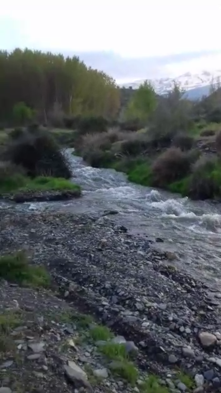 Río Verde